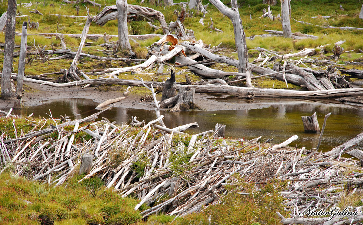 Castorera Tierra del Fuego